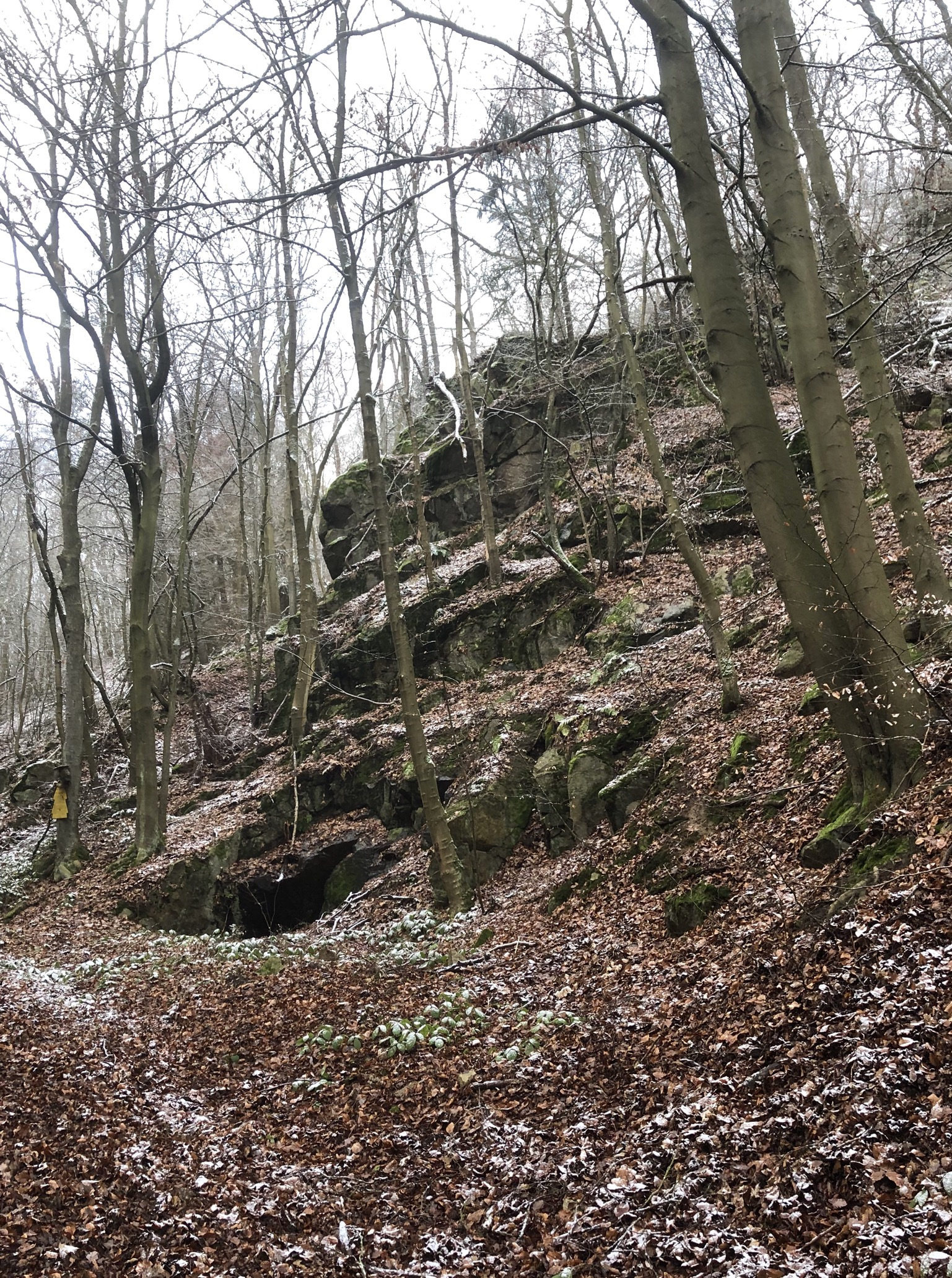 Sommerklippe bei Stecklenberg im Harz